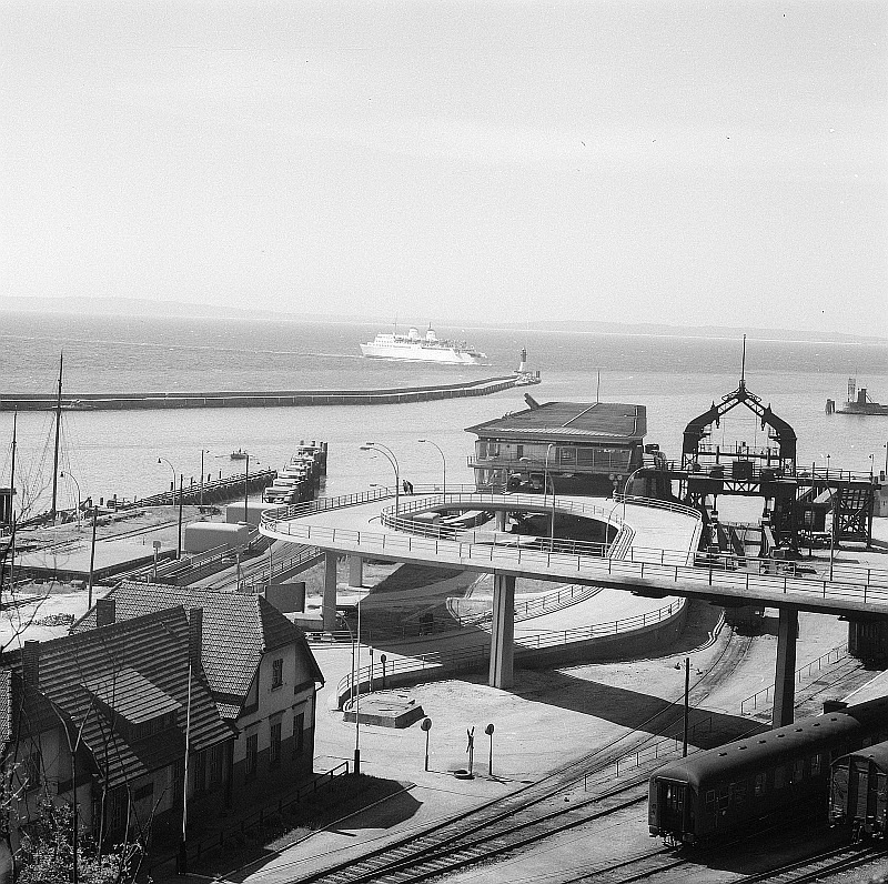 Original image description from the Deutsche FotothekSaßnitz. Fährhafen, Hafenanlagen